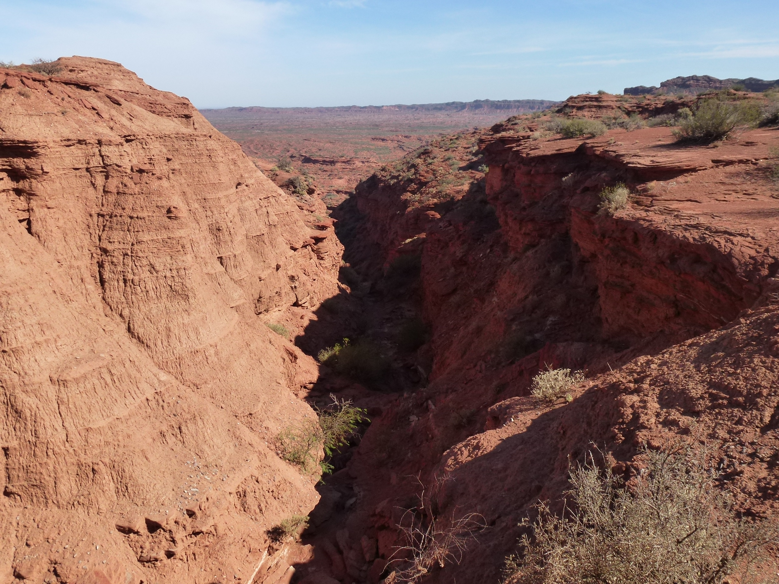 Parque Nacional Sierra de las Quijadas_San Luis_Argentina